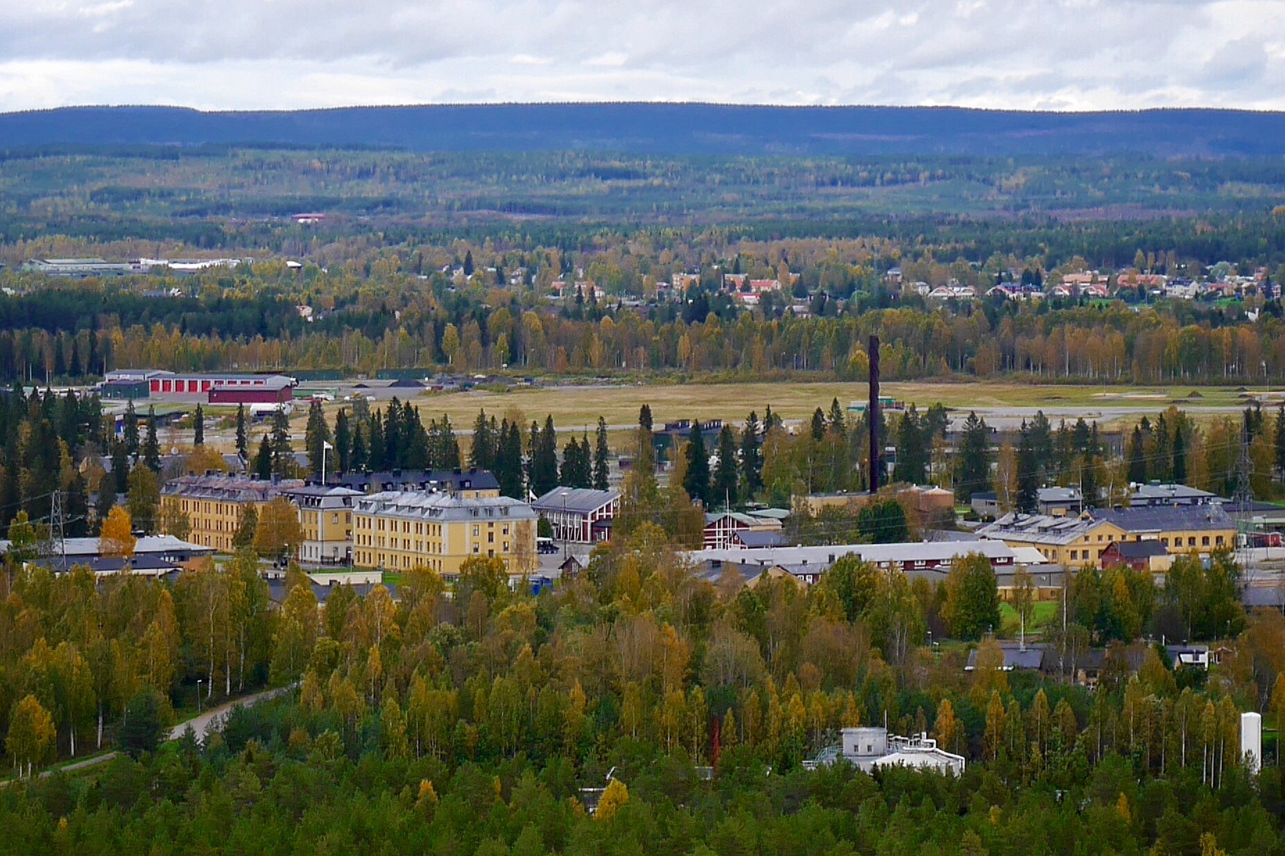 Artilleriregementet A8 (Boden 1:129 och 57:36) Artilleriregementet A 8 är ett av flera regementsområden som ingick i Bodens strategiska försvar och Bodens garnison.